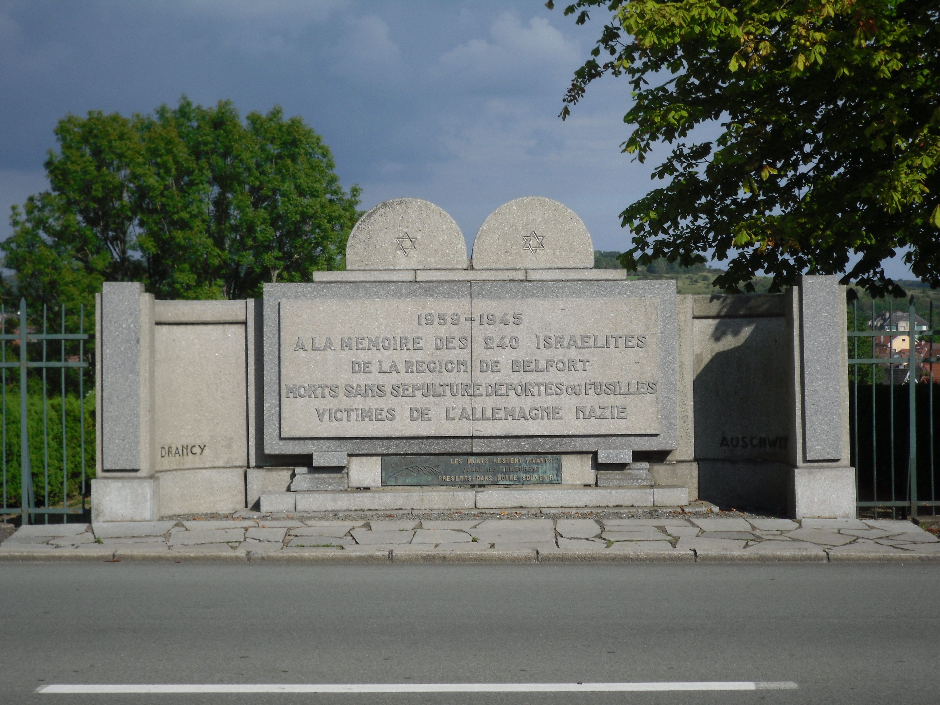 Monument aux morts du cimetière juif de Belfort. En effet, après la Première guerre mondiale, un monument aux morts dû à Eugène Traut, a été érigé. .